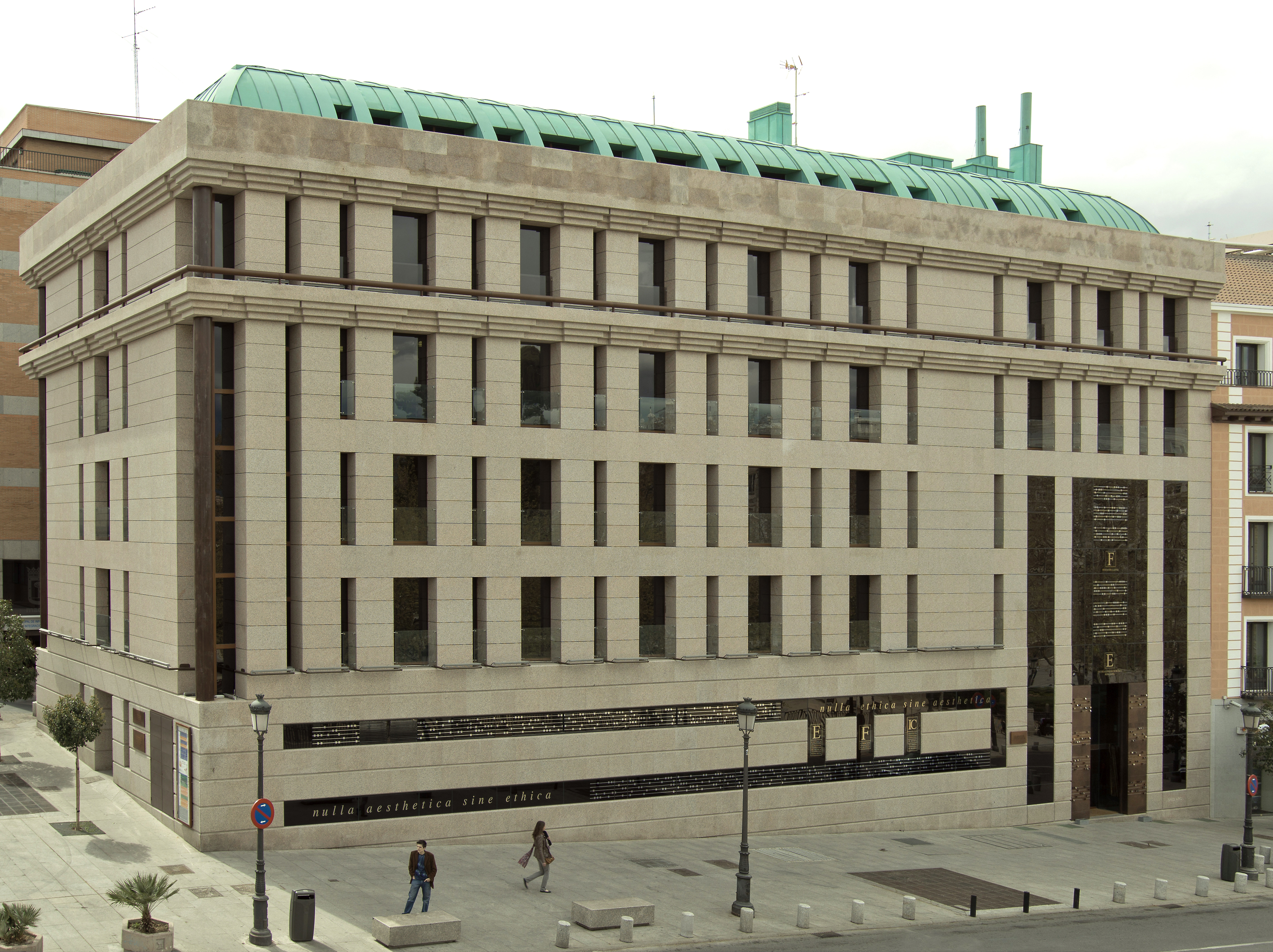 Edificio de la Escuela Superior de Música Reina Sofía